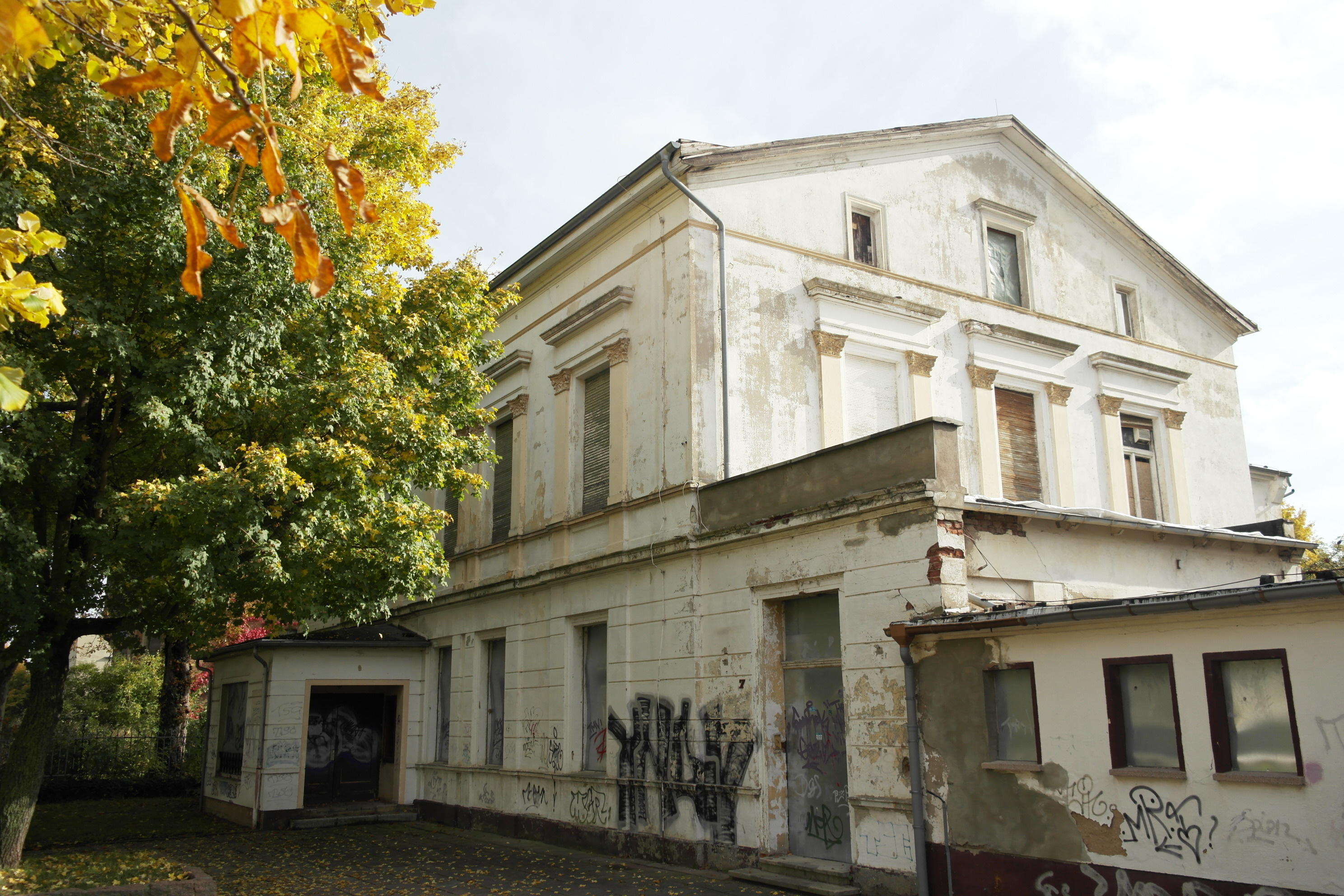 Bernburg, Gebäude des ersten Bernburger Bahnhofs am Rheineplatz, 2015 abgerissen